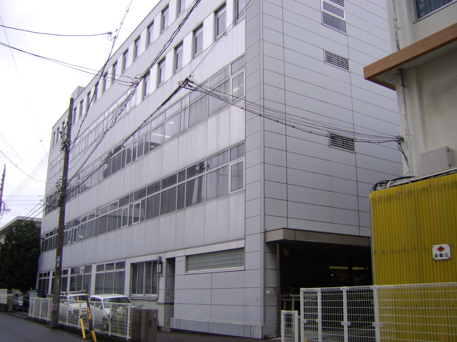 JR東海静岡支社に属する乗務員区所の静岡運輸区が入居する静岡運輸区ビル、静岡支社ビルの裏手にある